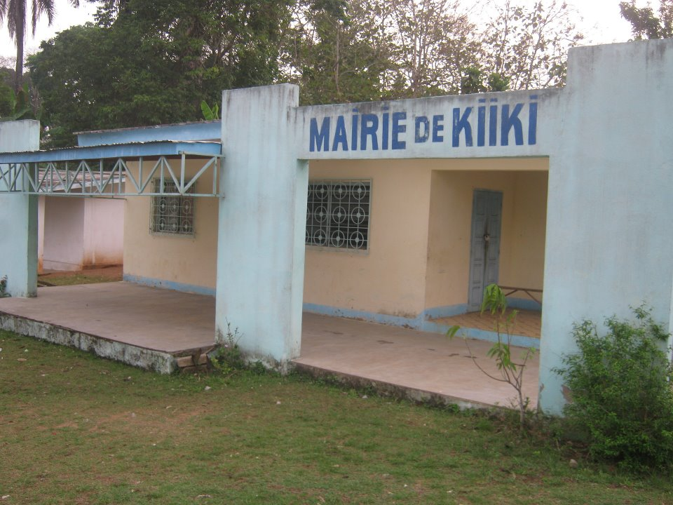 vue partielle de la mairie de Kiiki